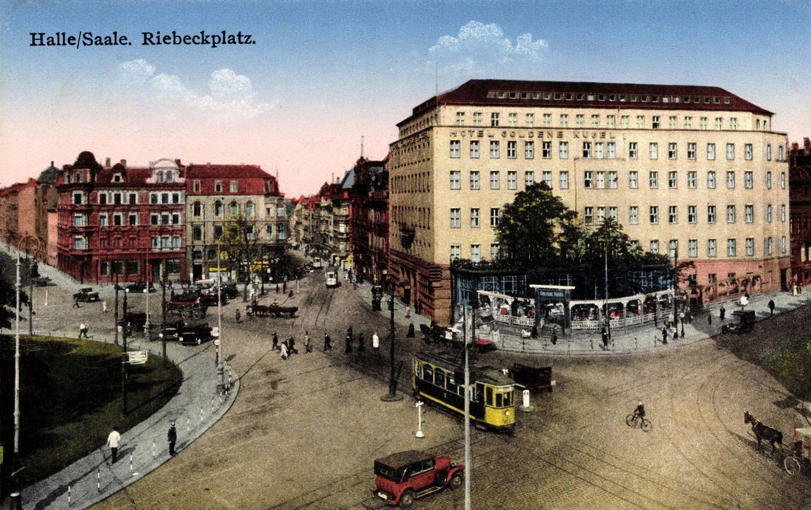 Halle, Riebeckplatz